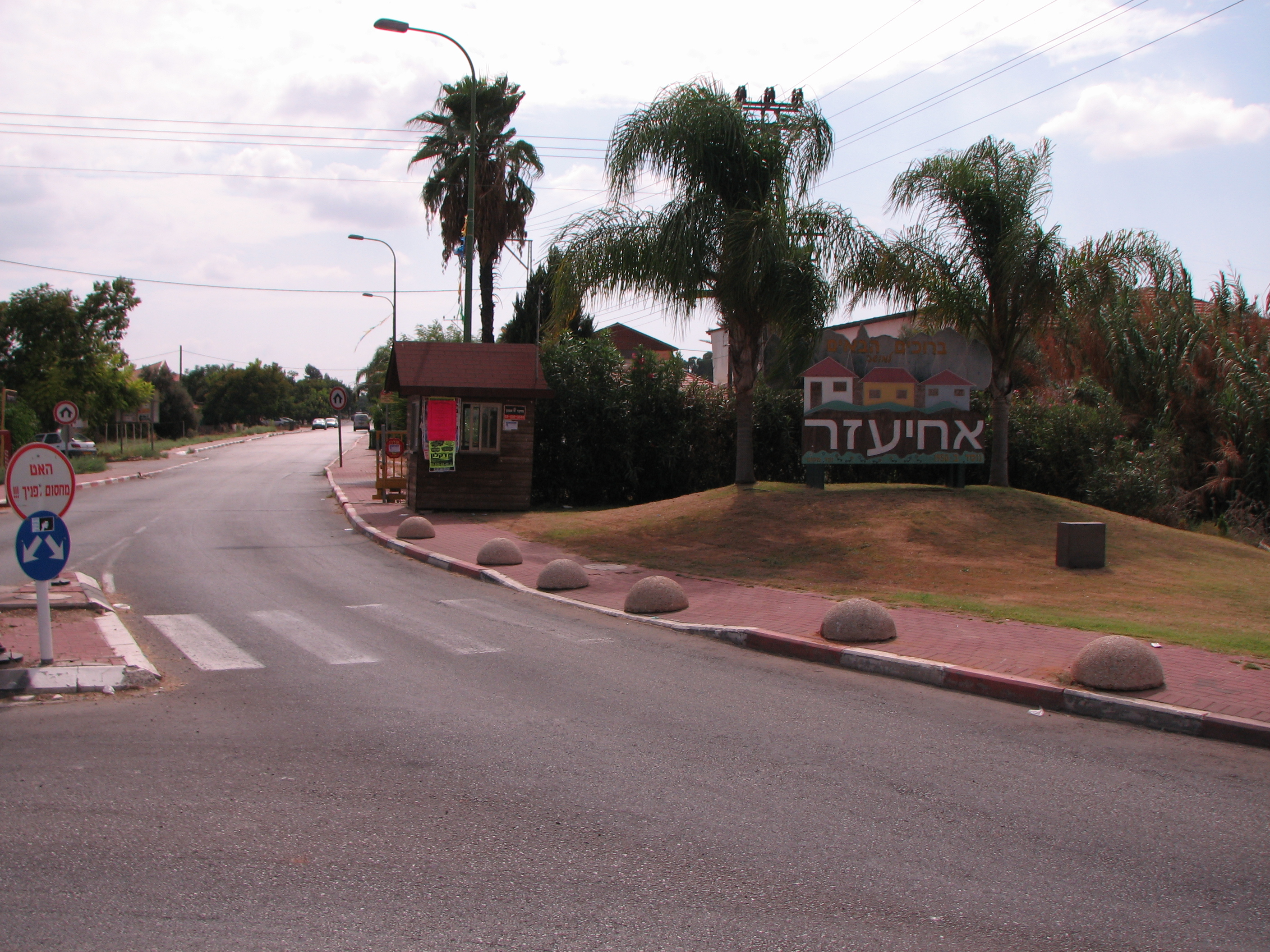 הכניסה למושב אחיעזר